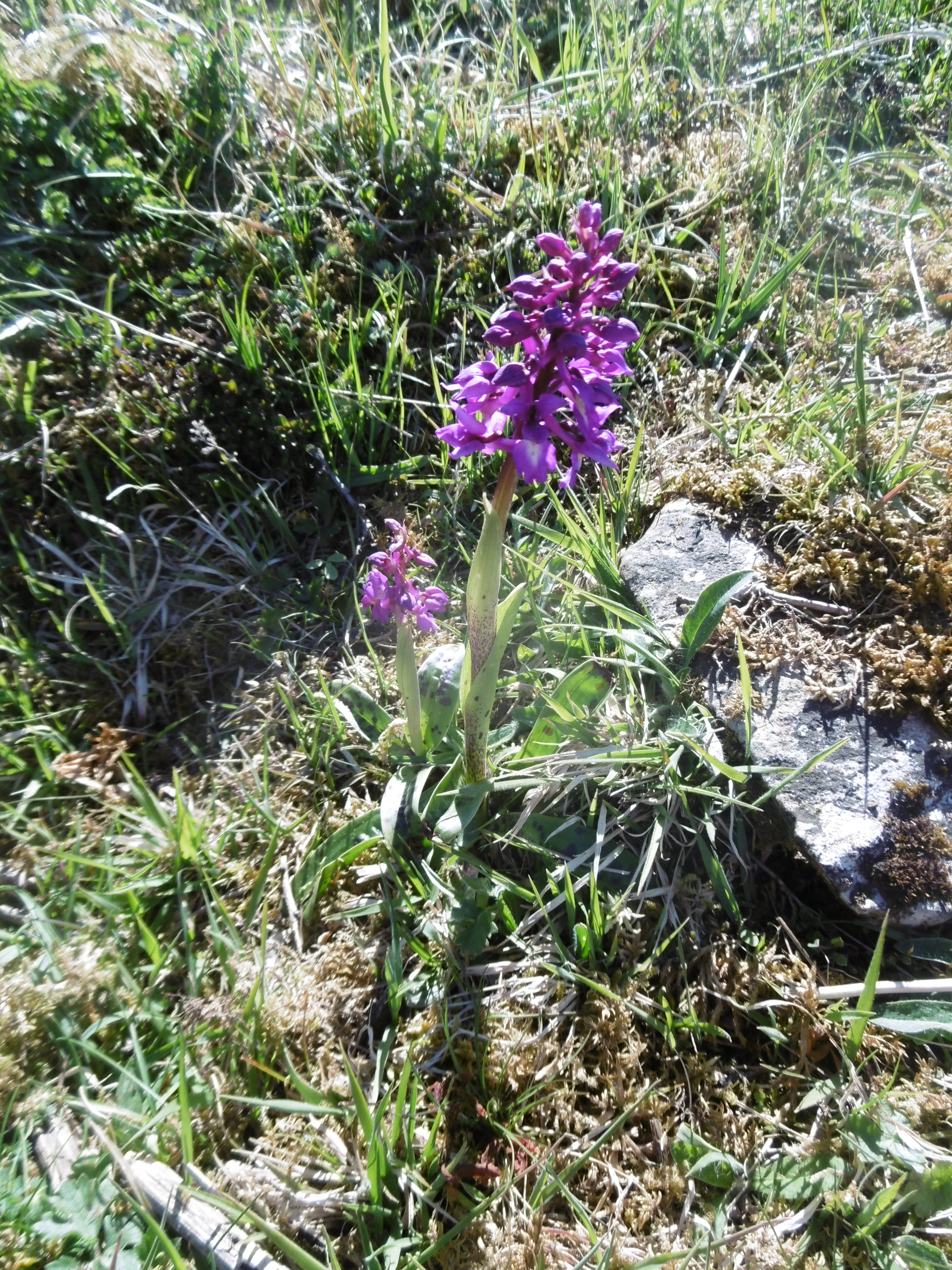 Manns Knabenkraut im Naturschutzgebiet Scheffelberg Kalberstert (Brilon, HSK, NRW, Germany).